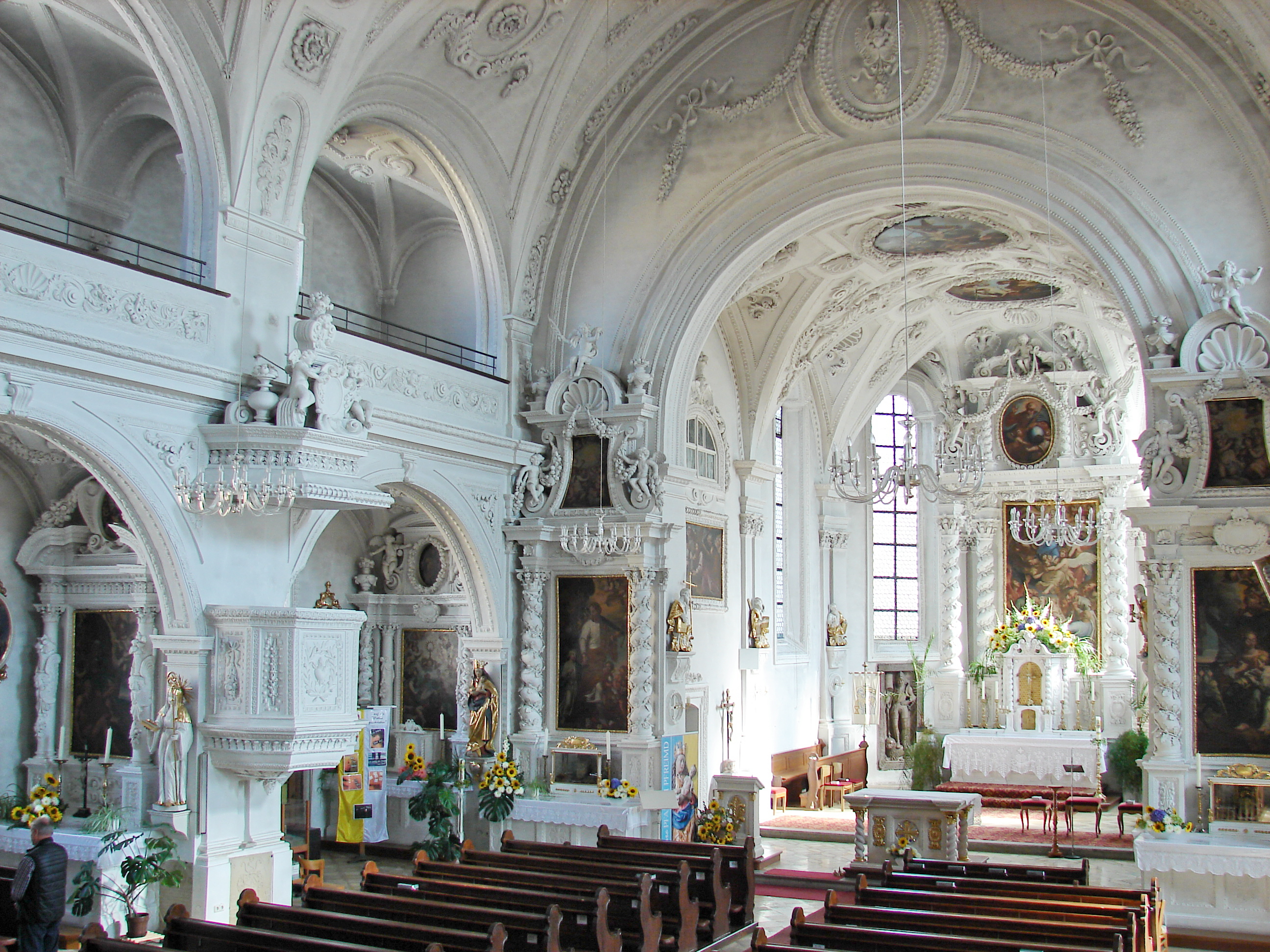 Katholische Stadtpfarrkirche Mariä Himmelfahrt in Pfreimd